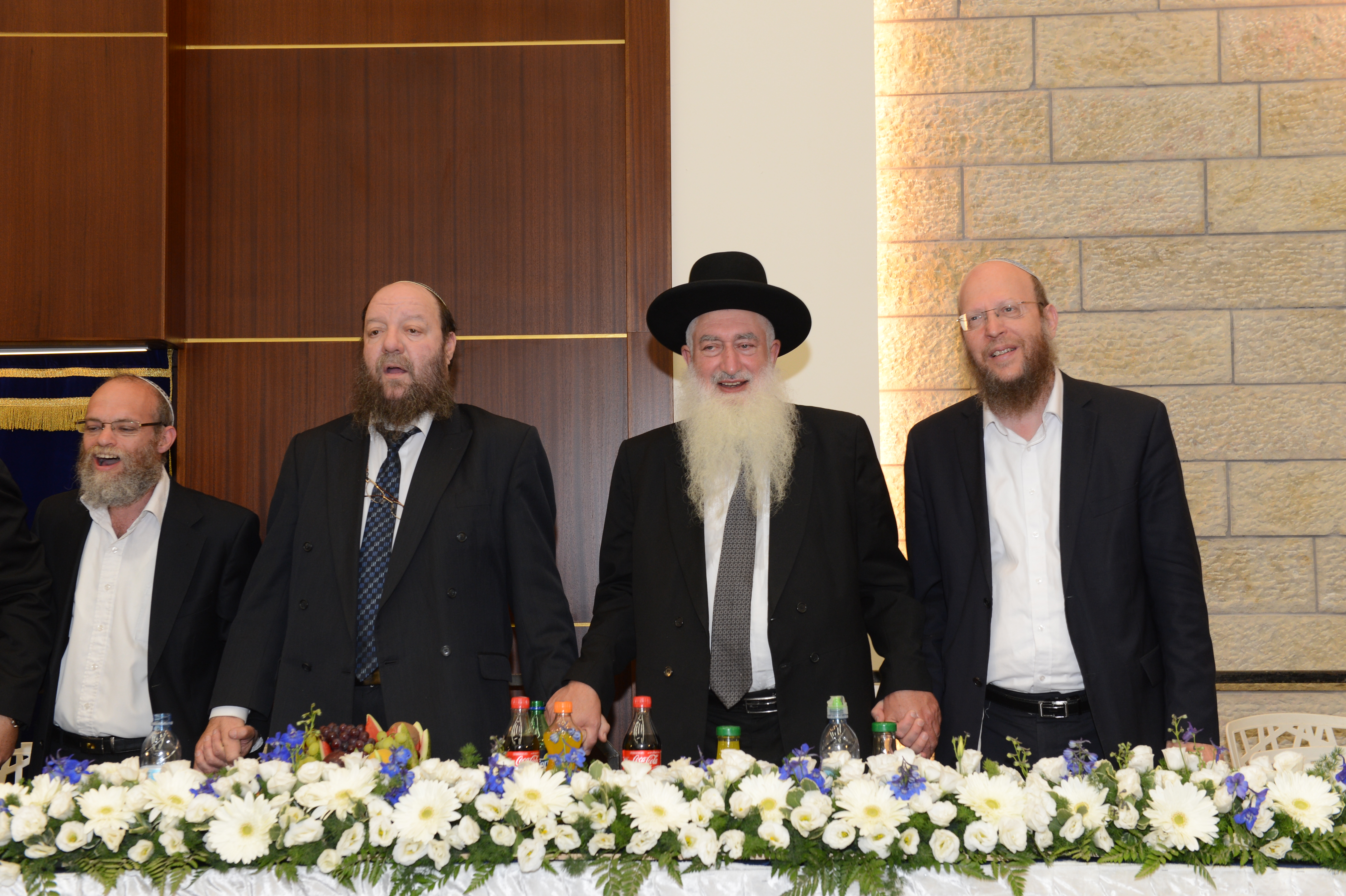 הרב יאיר גזבר (הימני) ביום ירושלים בישיבת מרכז הרב יחד עם הרב יוסף טולדאנו ,הרב משה קליין והרב אבינועם זומר.